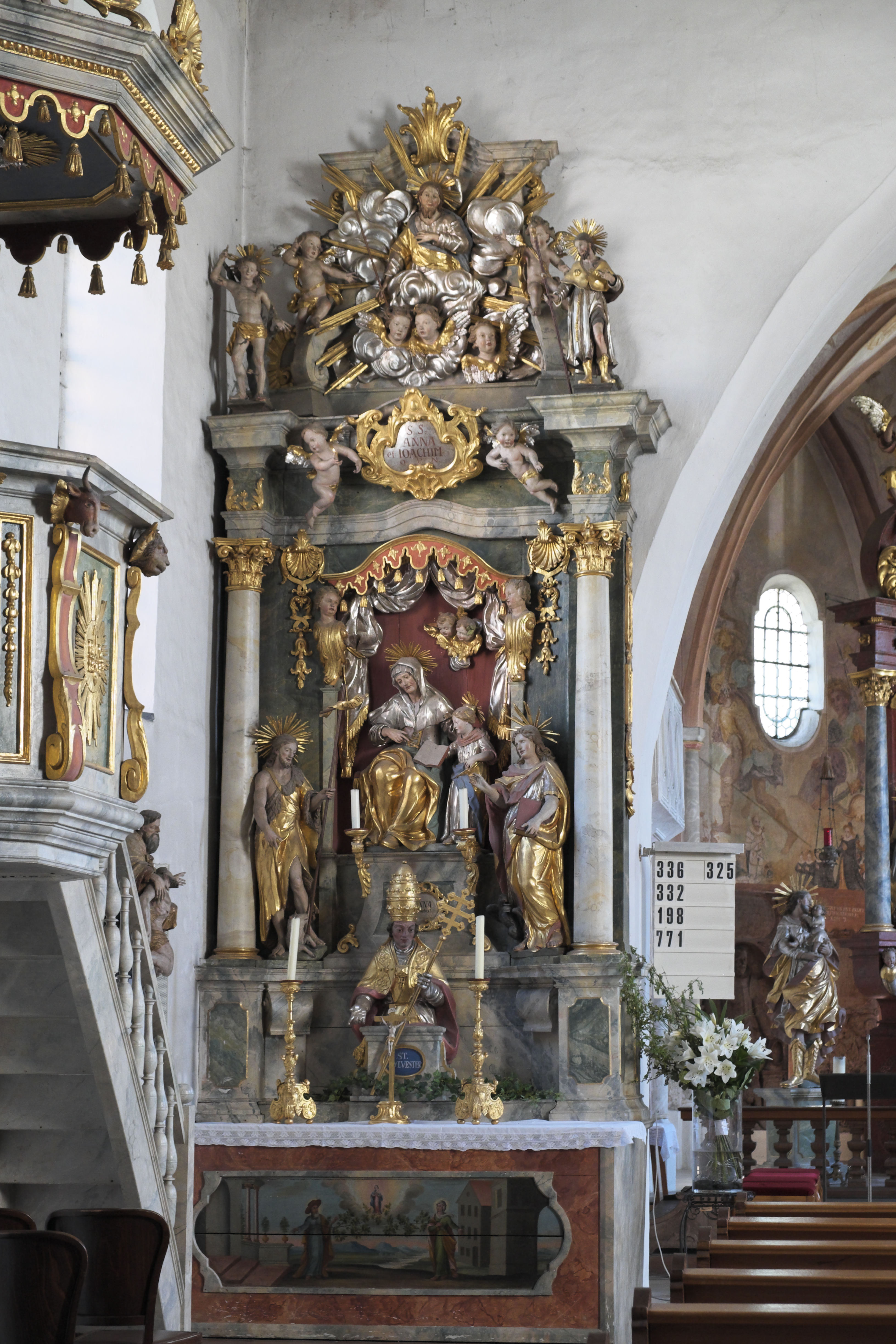 Katholische Filialkirche Unsere Liebe Frau in Gauting im Landkreis Starnberg (Bayern, Deutschland), linker Seitenaltar; Unterweisung Mariens